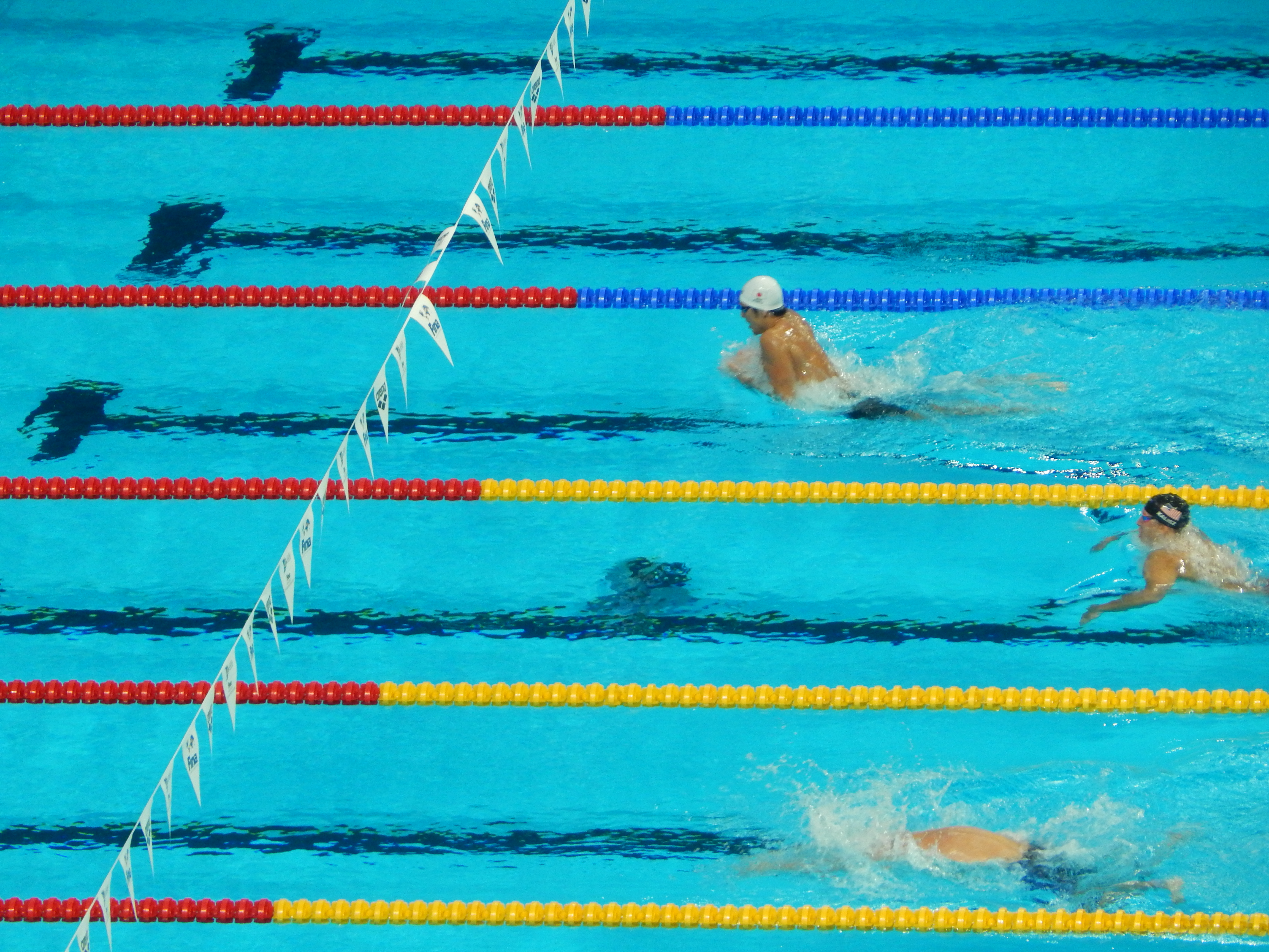 Дайя Сето плывёт к золоту чемпионата мира в Казани на дистанции 400 метров комплексом